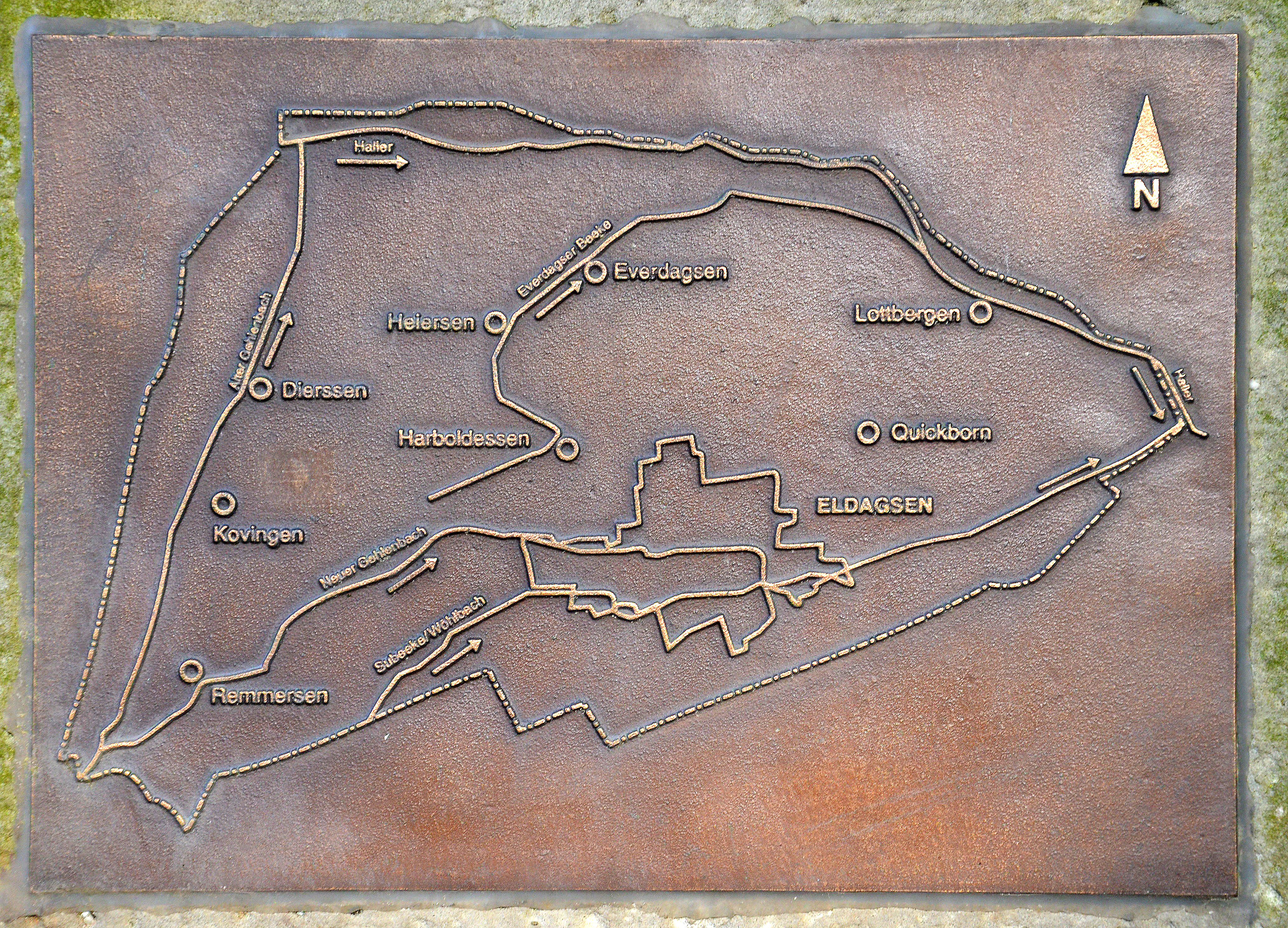 Eine von drei 1998 vom Heimatbund Eldagsen gestifteten Tafeln am Gedenkstein in Form einer Stele. Die Übersicht in Form einer Karte zeigt die Umrisse der Gemarkung Eldagsen sowie der jahrhundertelang selbständigen Stadt Eldagsen, den Verlauf der Fließgewässer in dem Gebiet sowie die Lage der acht vom 14. bis 16. Jahrhundert wüst gewordenen, "verschwundenen Dörfer" Remmersen, Kovingen, Dierssen, Heiersen, Harboldessen, Everdagsen, Quickborn und Lottbergen. Die Namen der ehemaligen Dörfer sollen sich bis heute in Flurnamen erhalten haben. Zudem ist der Verlauf der Bäche und Flüsschen skizziert, insbesondere der Abzweig des - im 15. Jahrhundert künstlich angelegten - Neuen Gehlenbachs vom sogenannten "Alten Gehlenbach, zusätzlich die Subeeke beziehungsweise der Wöhlbach sowie die Everdagser Beeke, die sämtlich in die Haller fließen ...